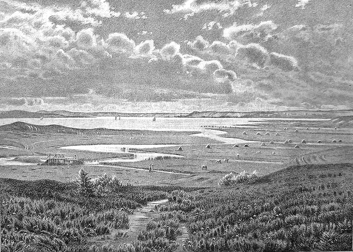 Hjarbæk Fjord